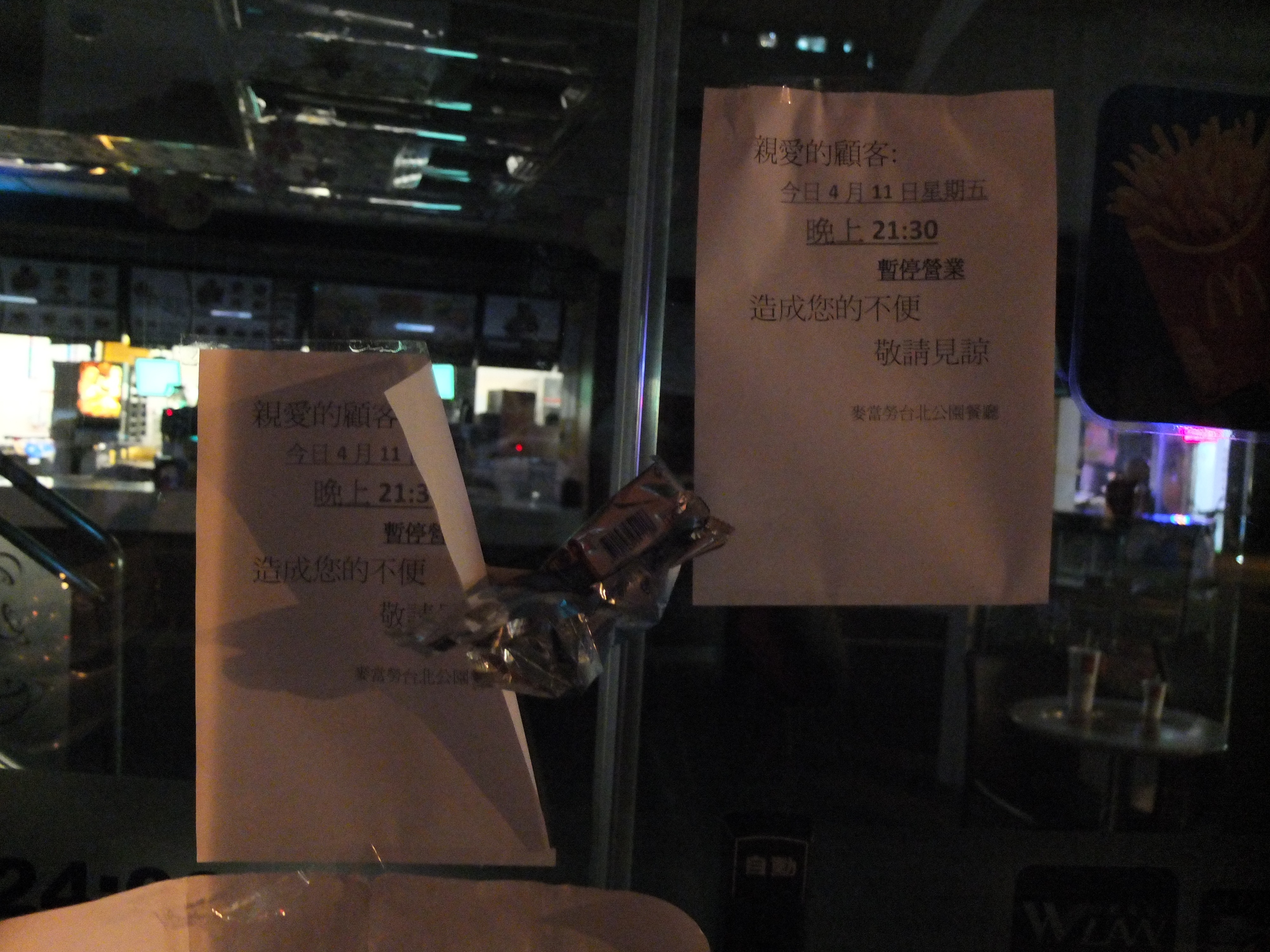 24小時營業的臺北麥當勞館前路店因411包圍中正一分局事件關門